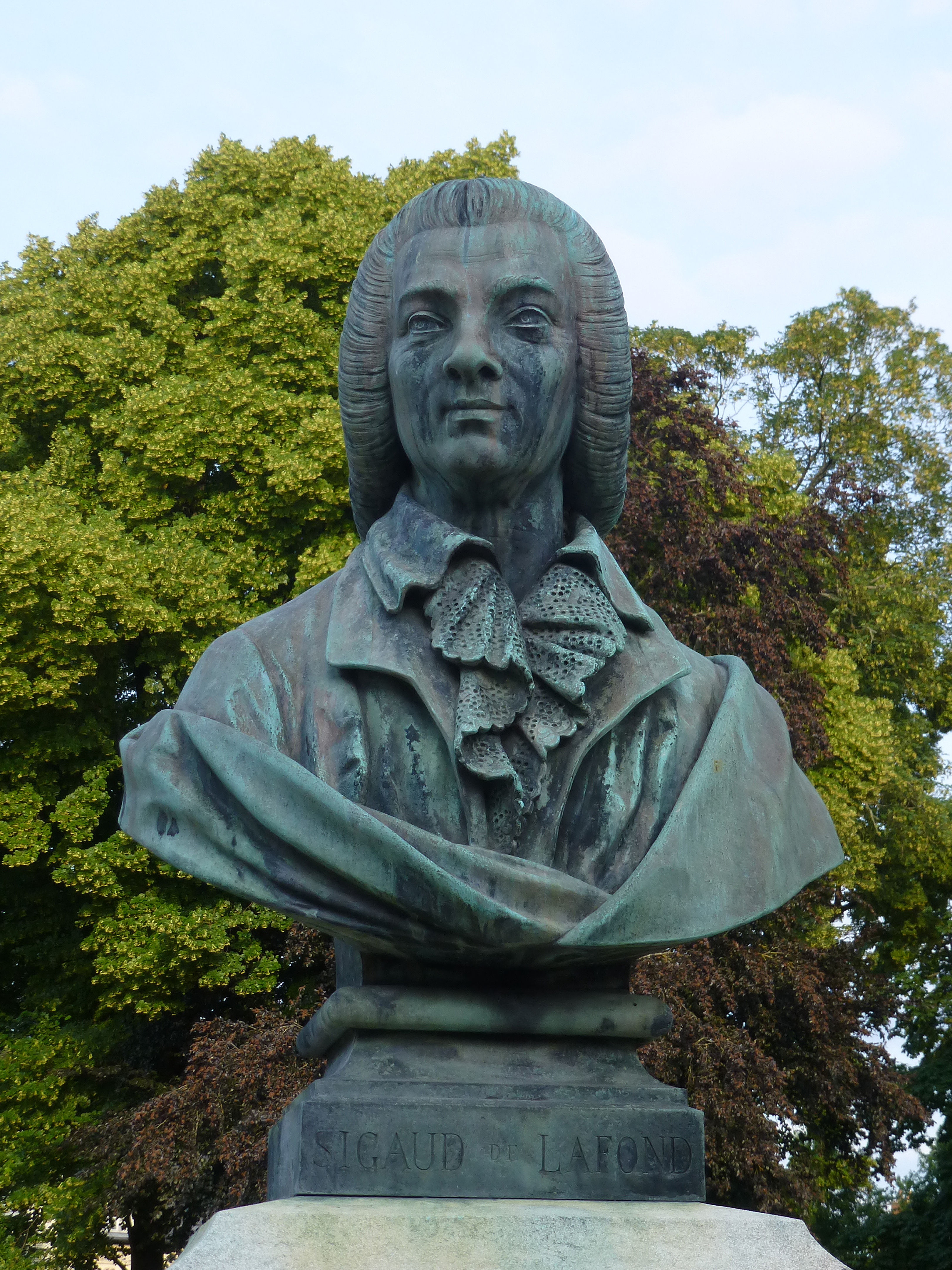 Bourges : buste du physicien Joseph-Aignan Sigaud de Lafond dans les jardins de l'archevêché